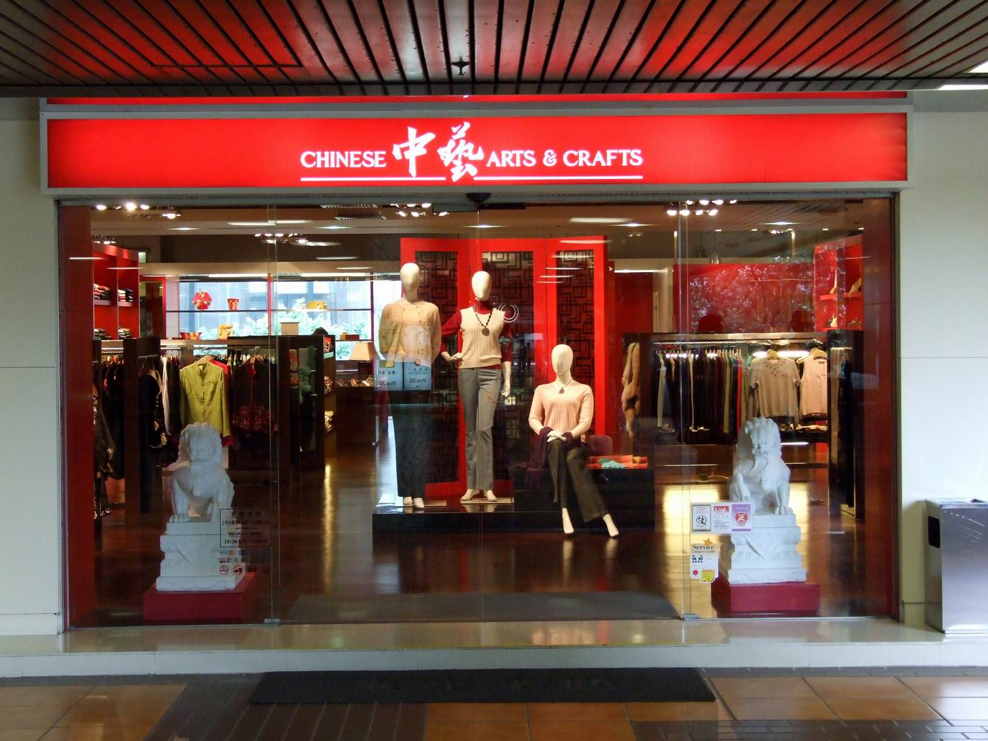 中藝華潤大廈分店